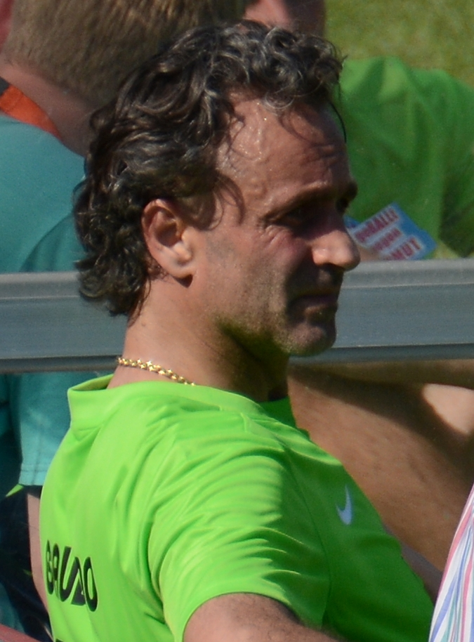 Maurizio Gaudino